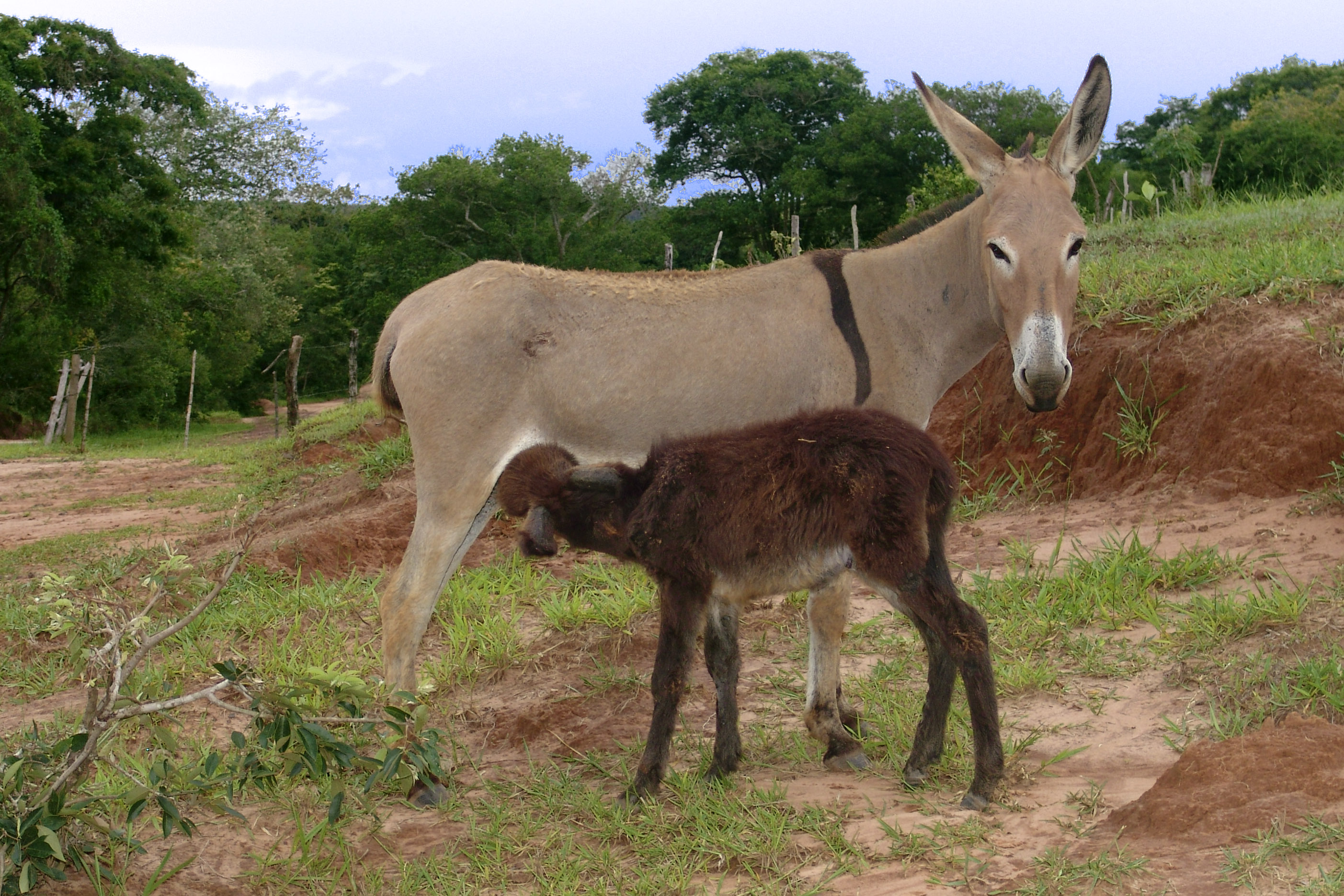 "Equus asinus" - Burro (fêmea) amamentando filhote